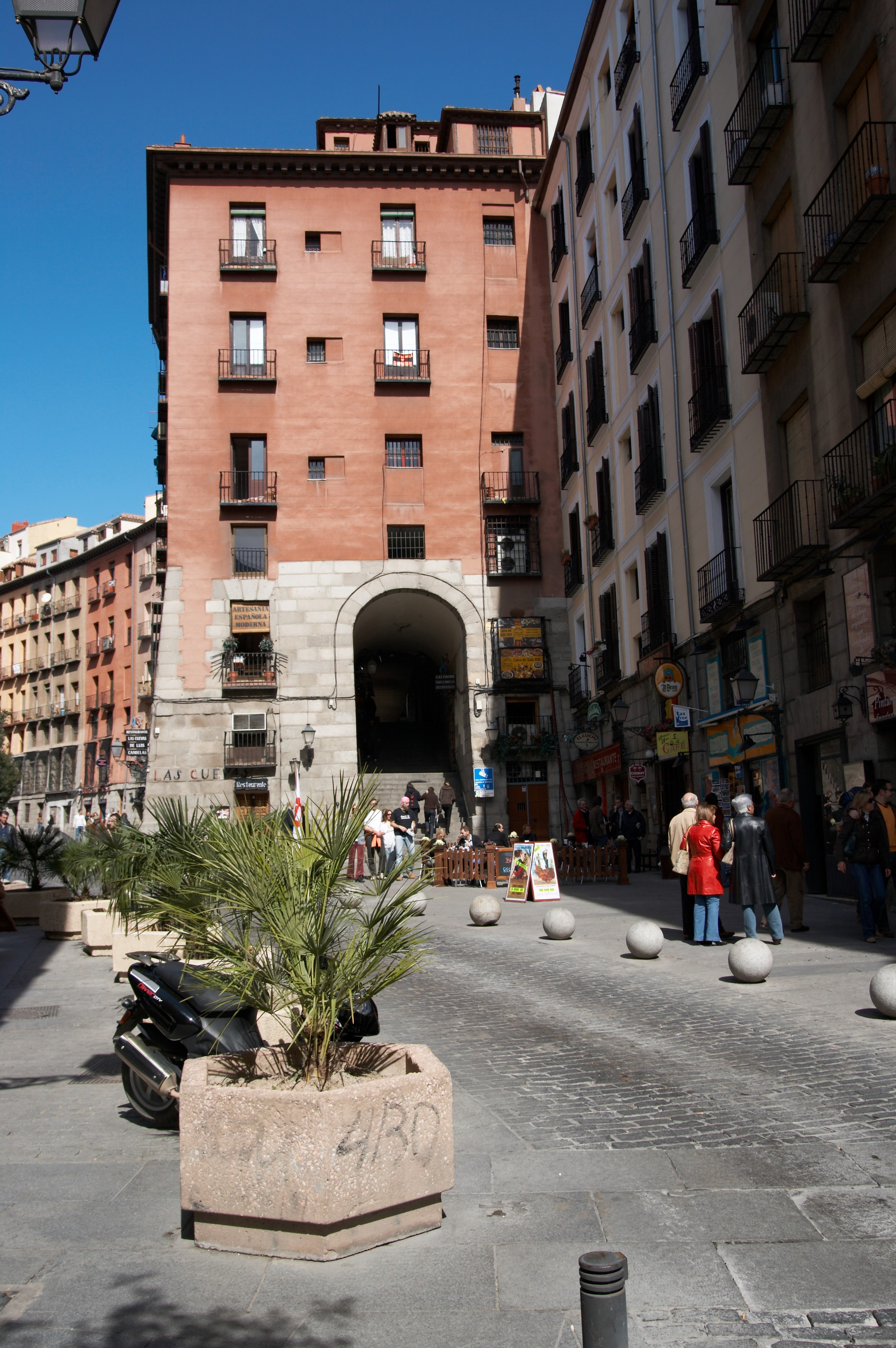 Arco de Cuchilleros, Plaza Mayor, Madrid.